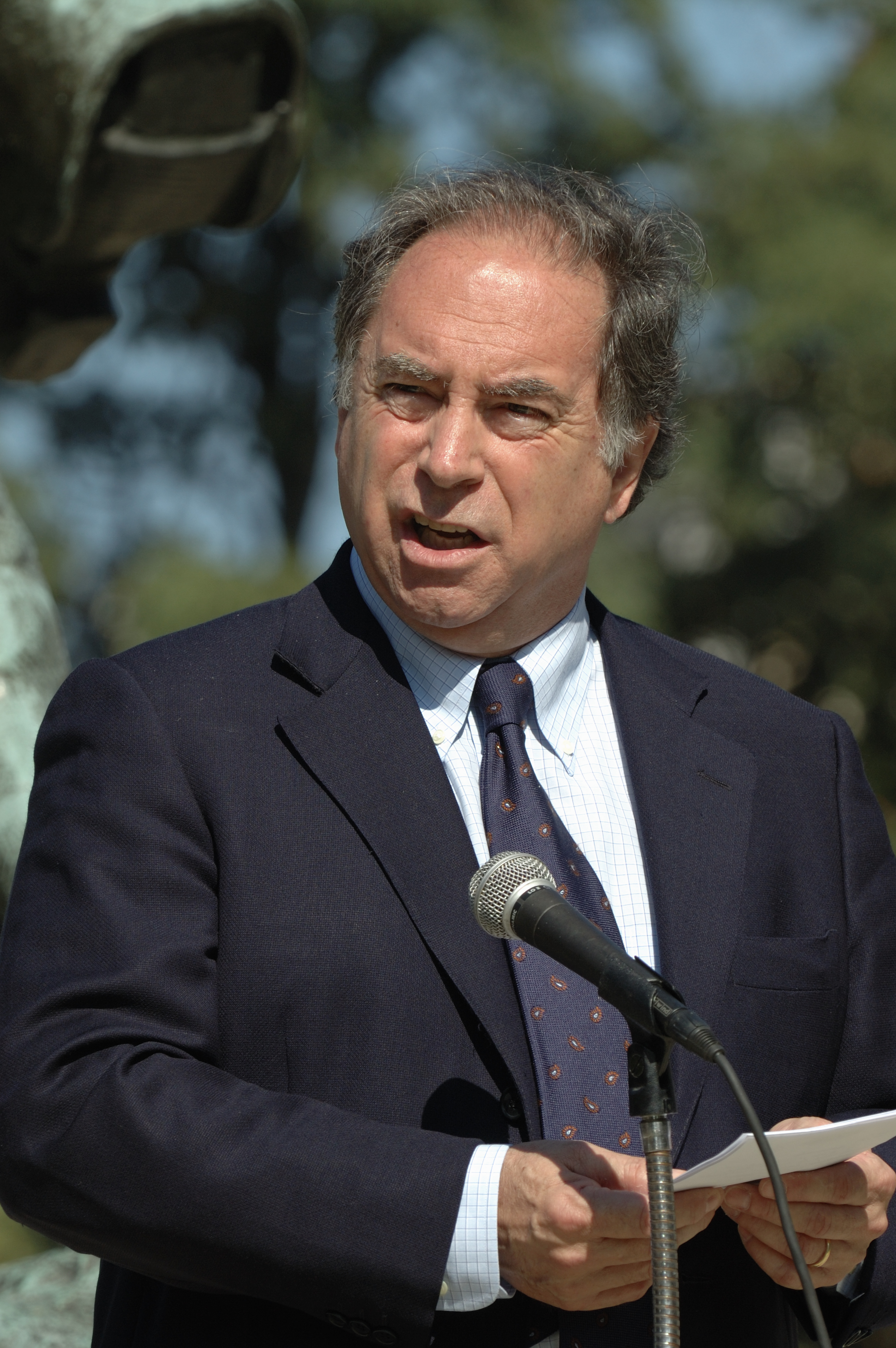 Juan Gabriel Valdés Soublette (Santiago, 1947) es un cientista político y diplomático chileno, ex ministro de Estado del presidente Eduardo Frei Ruiz-Tagle.